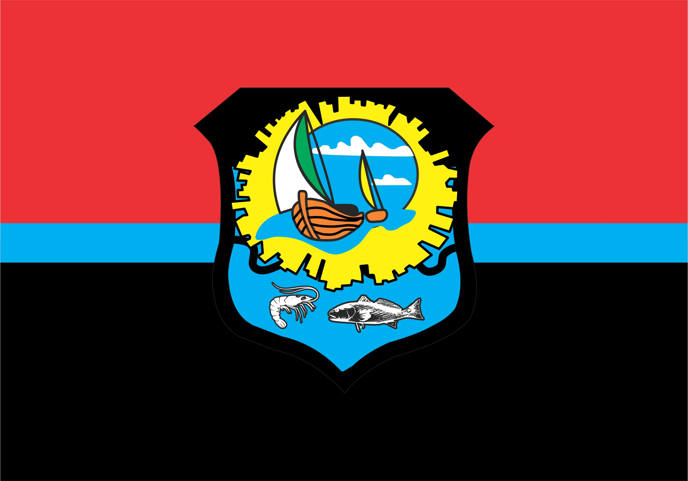 Bandeira do município brasileiro de Apicum-Açu, estado do Maranhão